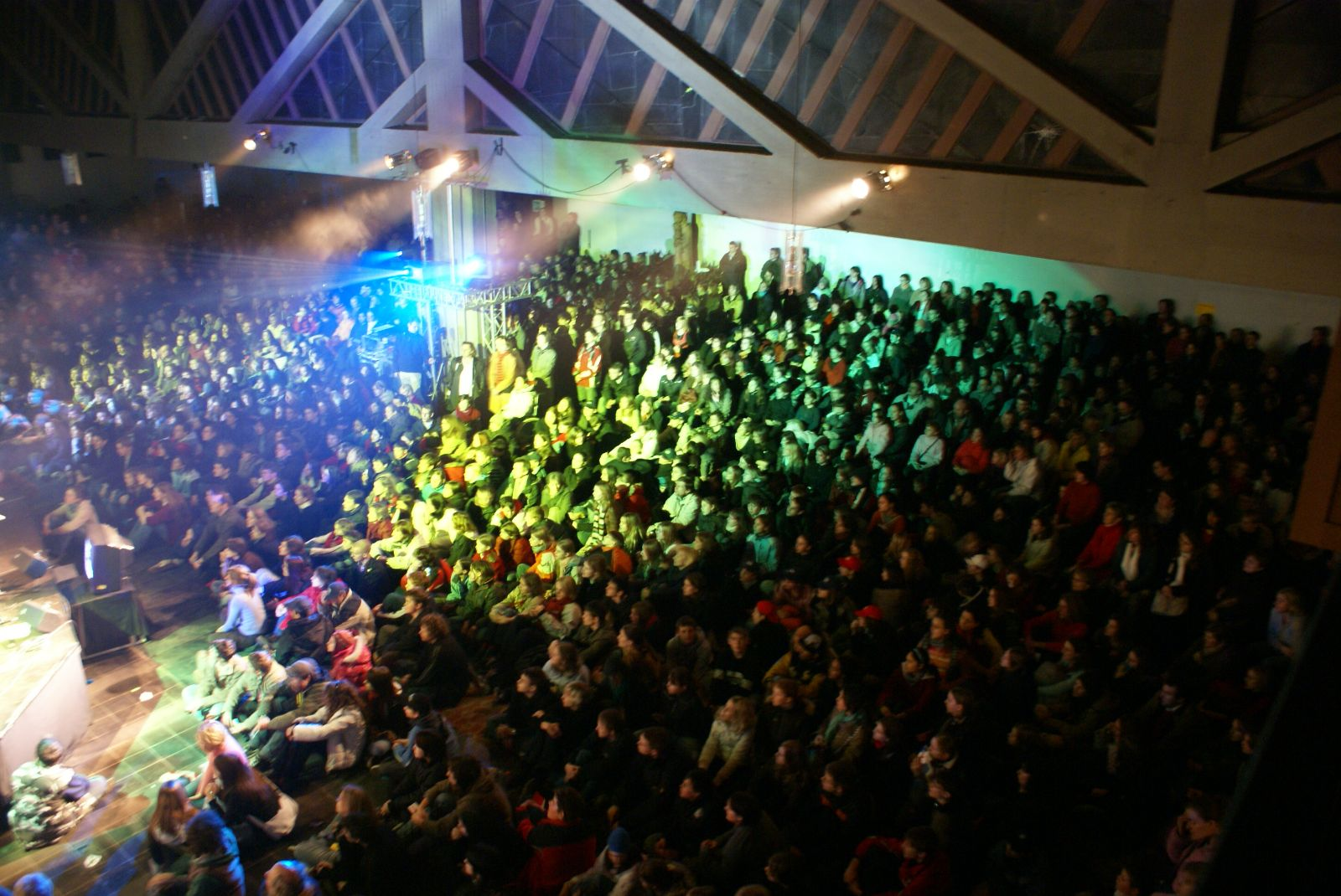 Die Jugendgottesdienste find•fight•follow werden durchschnittlich von 1500 Jugendlichen besucht.